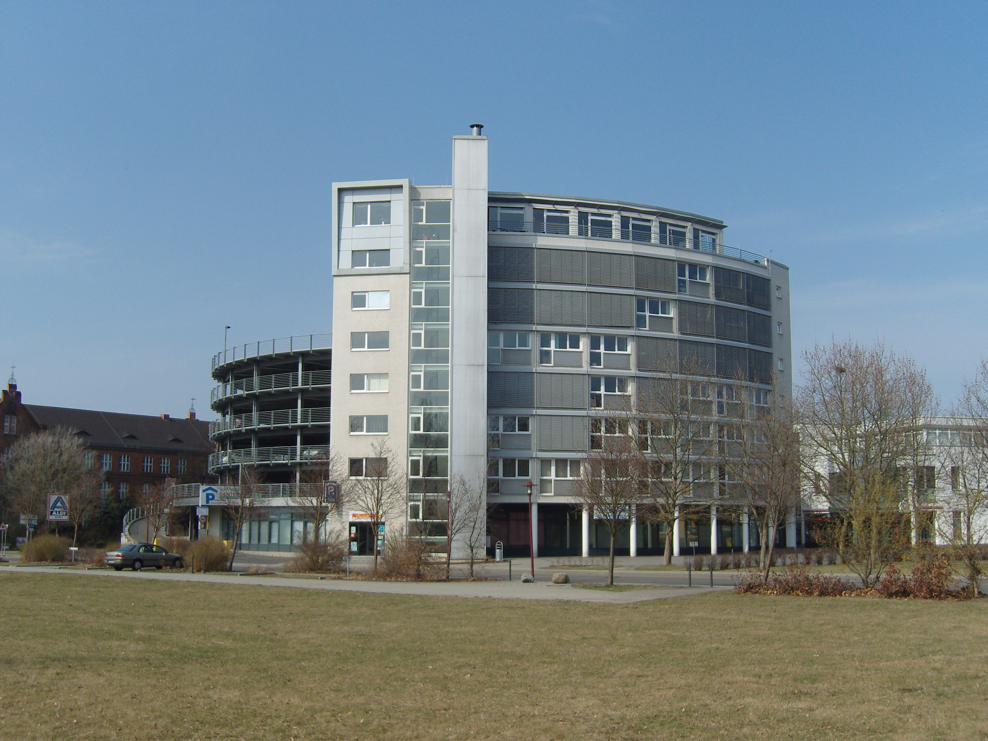 Verwaltungsgebäude am Parkhaus in Senftenberg, unter anderem Sitz des Arbeitsgerichts